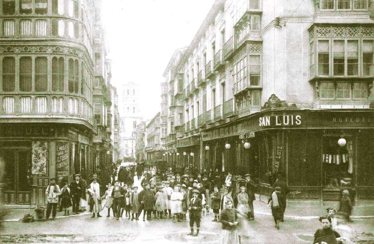 Calle Regalado - Valladolid - Libro Valladolid hace 100 años, igual que la 1146 - Postal B/N